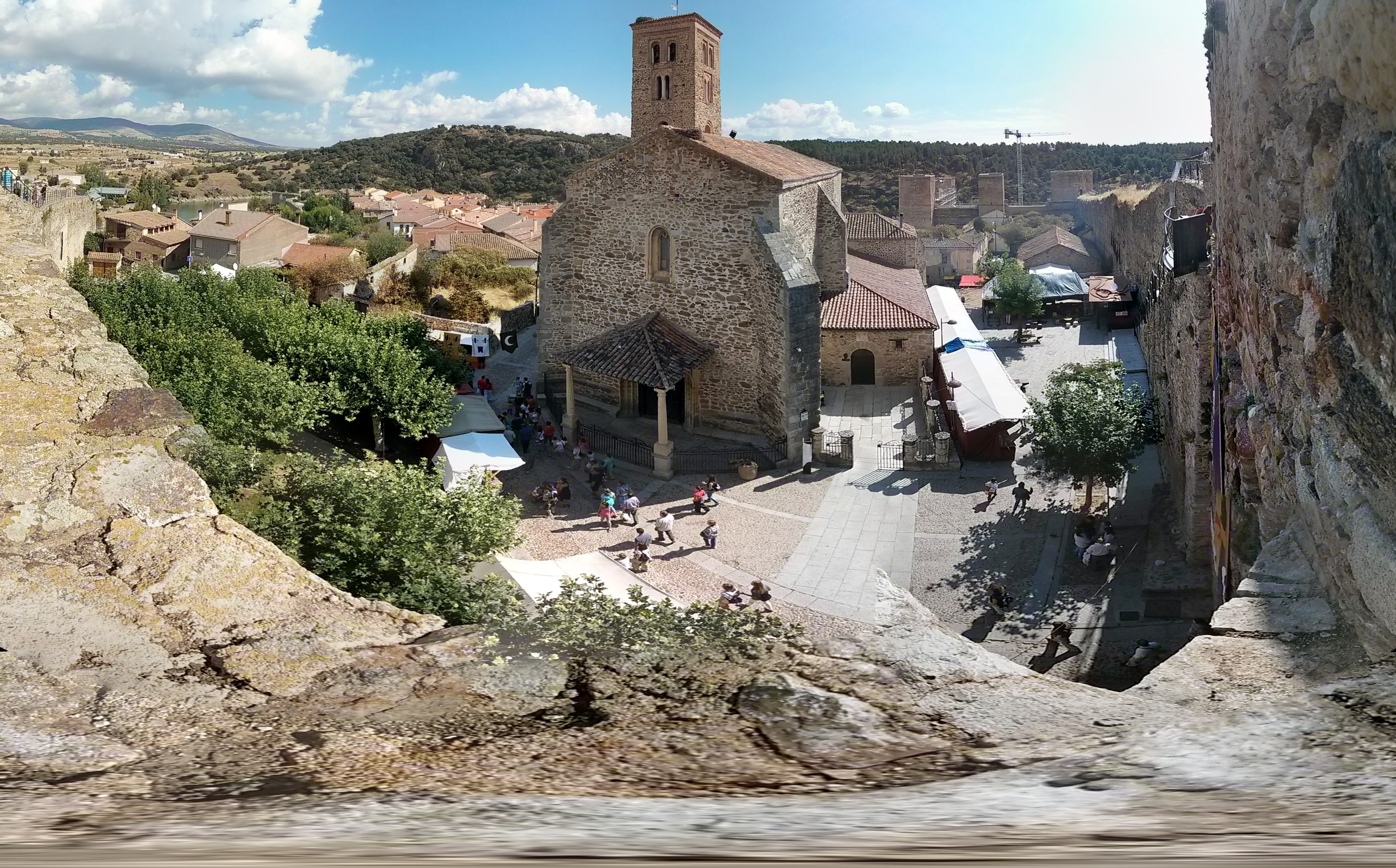 Conjunto histórico medieval de Buitrago del Lozoya